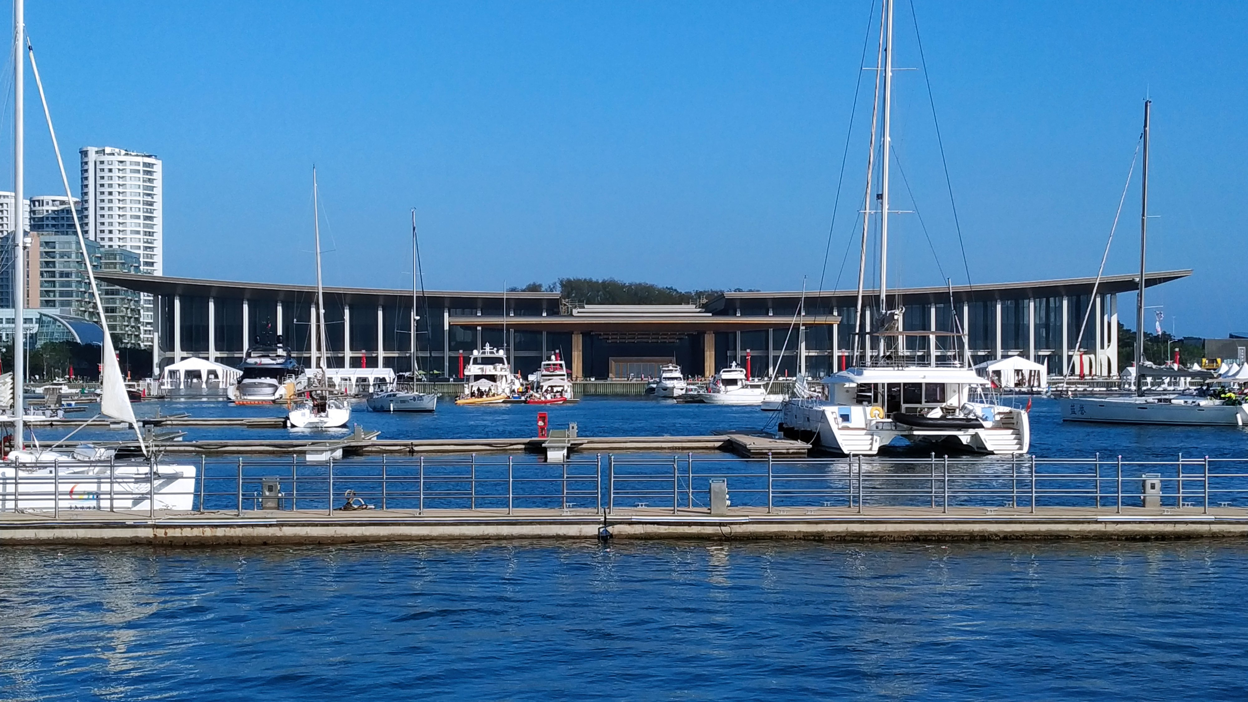 中文（中国大陆）: 青岛国际会议中心